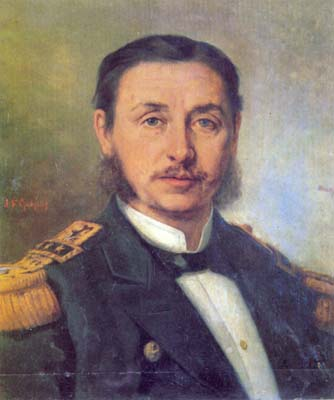 Juan Francisco Gonzalez